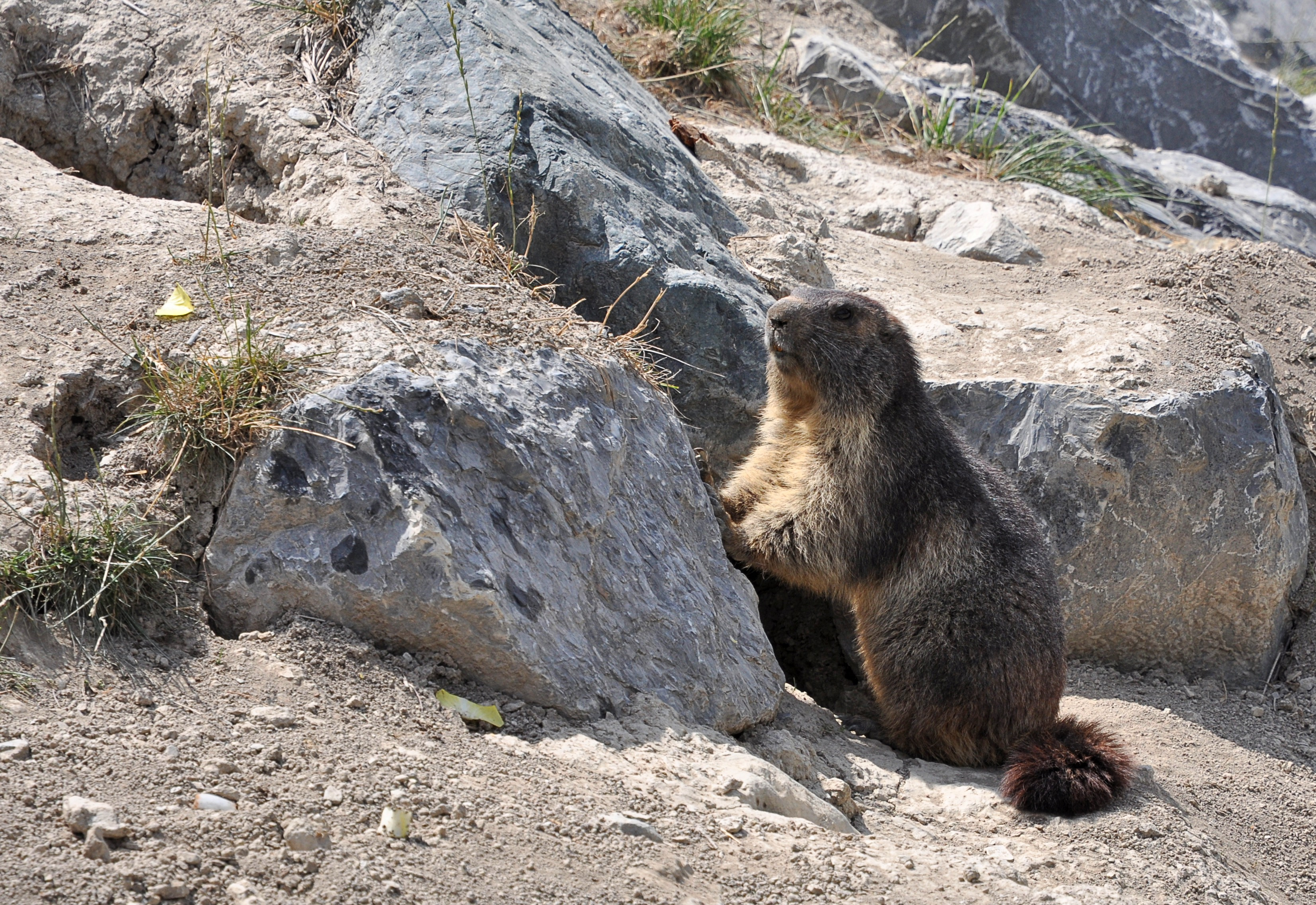 Marmotte prise dans un parc des Htes Alpes